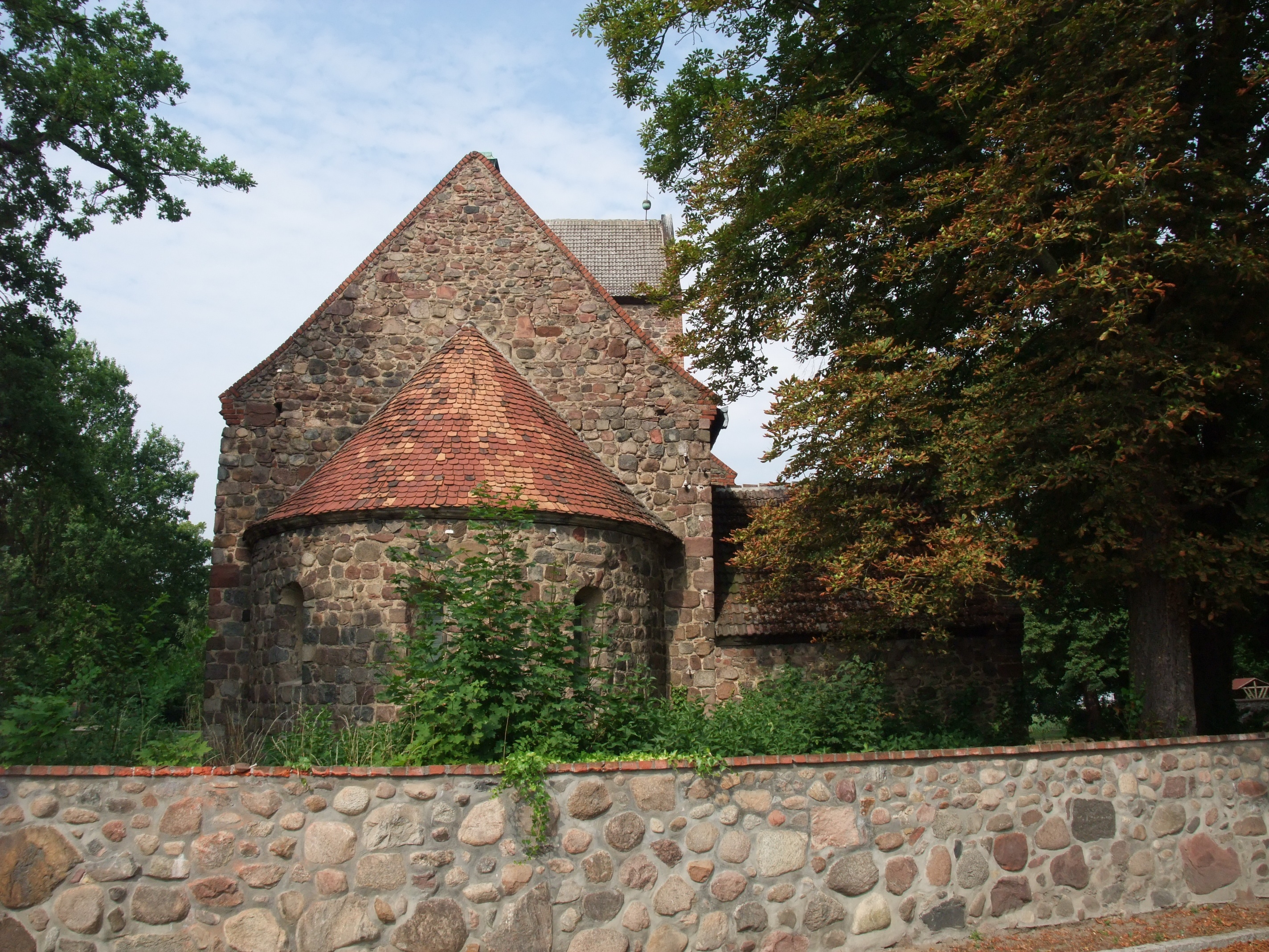 Kirche in Lindenberg (Barnim), Deutschland.